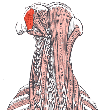 Musculus obliquus capitis superior